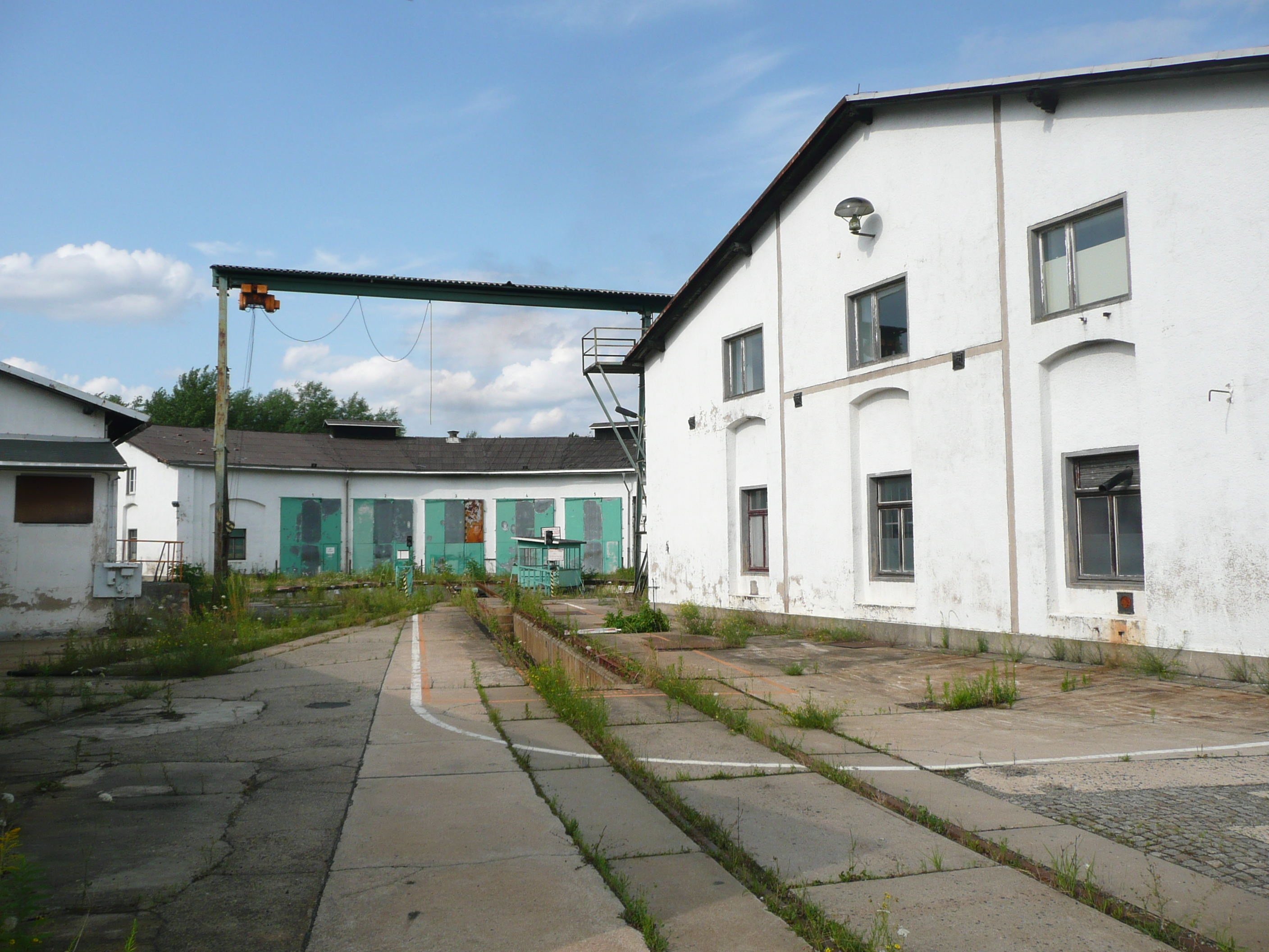 Ansicht des Rundschuppens im Bahnbetriebswerk Kamenz 2015